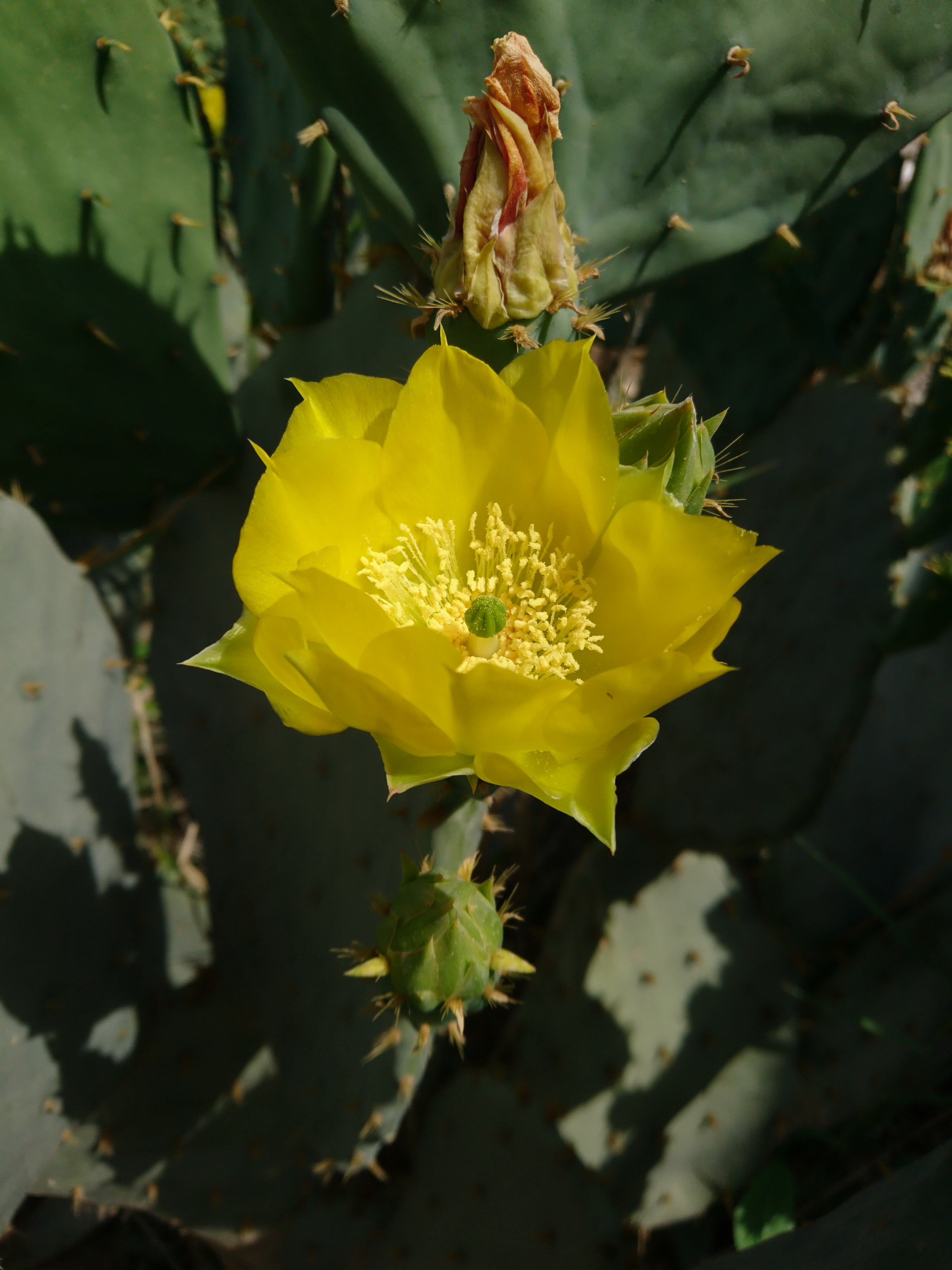 Opuntia Cactus in Behbahan